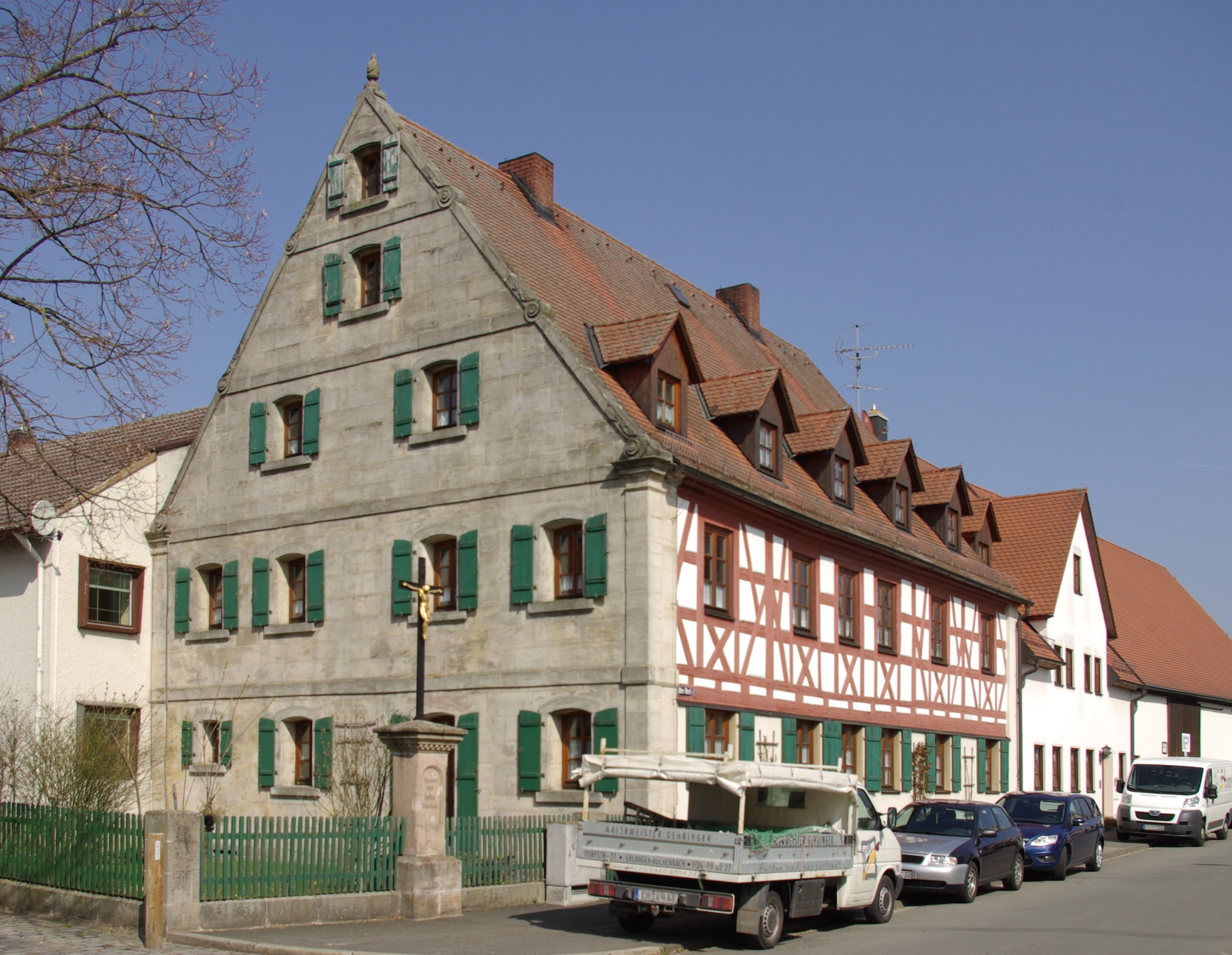 Facherk- und Sandsteinhaus im Erlanger Stadtteil Büchenbach